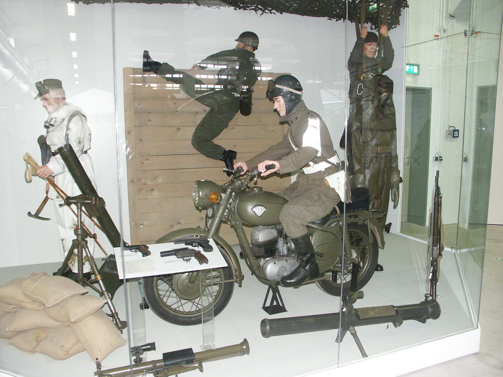 Bundeswehrmuseum Dresden mit Teilen von der NVA